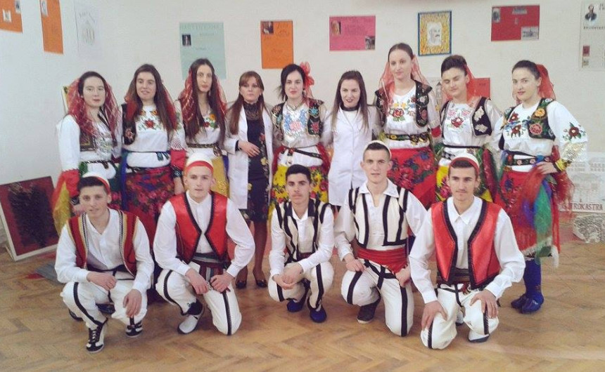 Kostume popullore vajzash dhe djemsh te krahines se Tropojes, te veshur nga nxenesit e shkolles "Ali Iber Neza" Tropoje e Vjeter